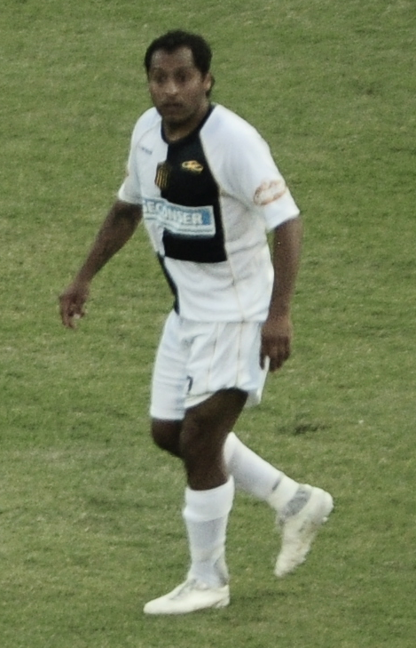 Partido del 18 de marzo de 2013, Rosario Central 2-Olimpo 2; Antonio Medina de Rosario Central.